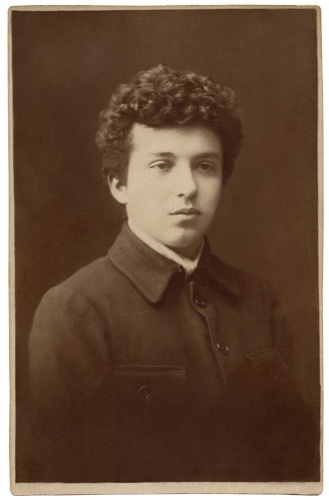 Антон Керсновский. Во время обучения за границей, середина 1920-х годов